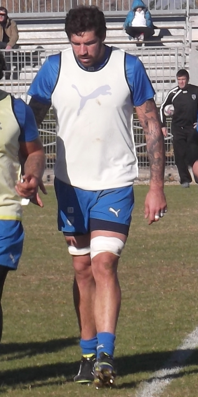 Jim Hamilton (Montpellier) à l'entraînement.